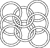 Motif de fabrication dit '4x1' des cottes de mailles